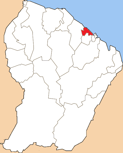 Situation du canton dans le département de la Guyane